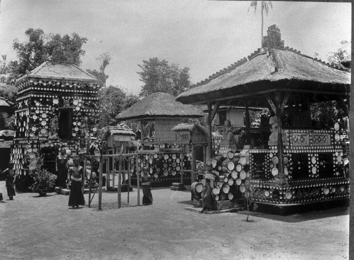 Foto. Bali, tempelcomplex Poera Satria